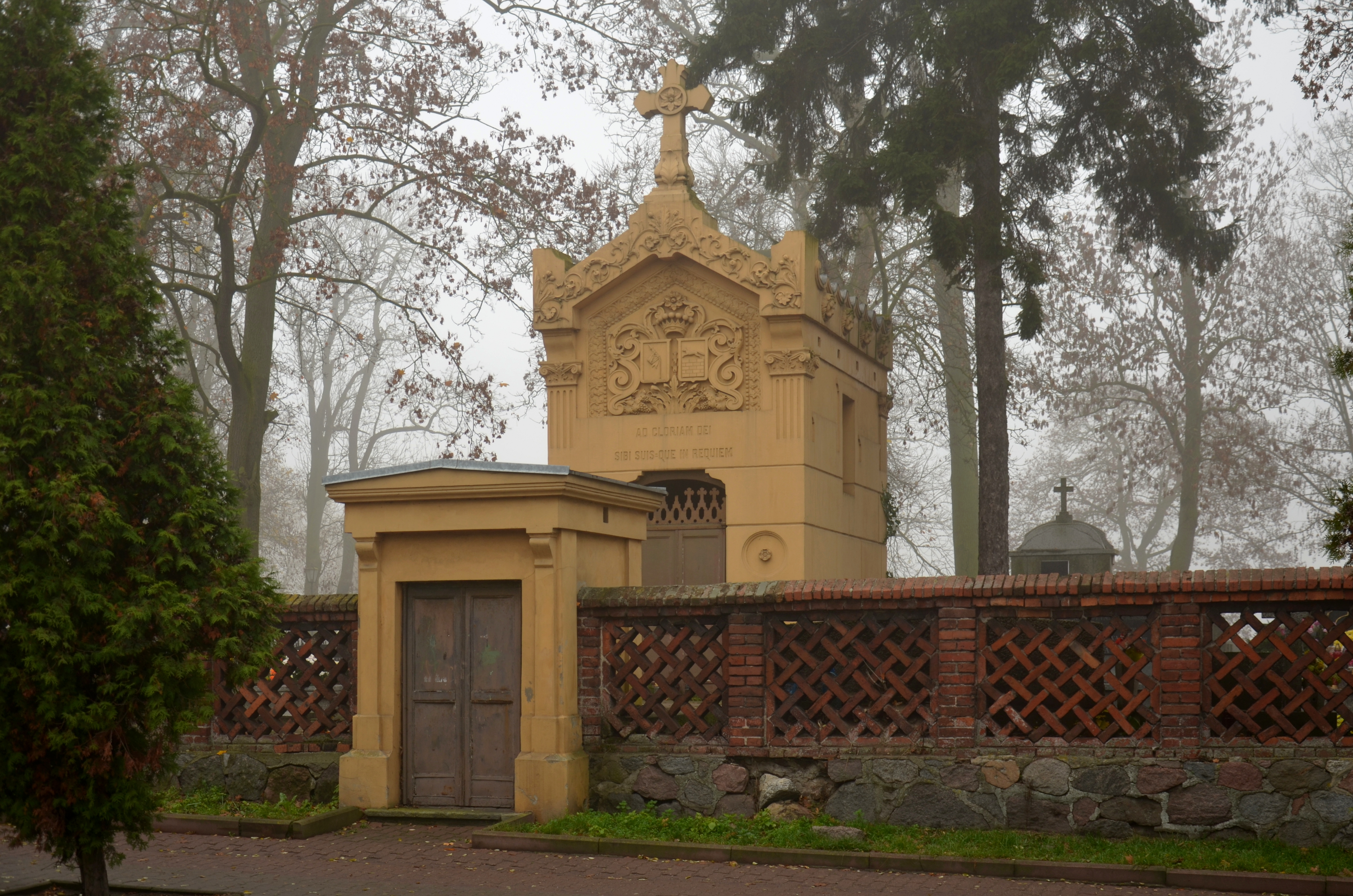 Chełmża, mauzoleum rodziny Zawiszów-Czarnych, 1879